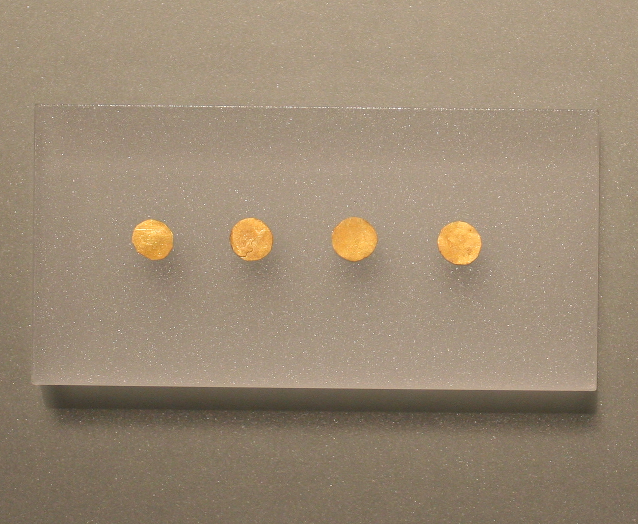 Grab eines Schmiedes der Glockenbecherkultur aus Eythra, 2500-2200 v. Chr.; Staatliches Museum für Archäologie Chemnitz